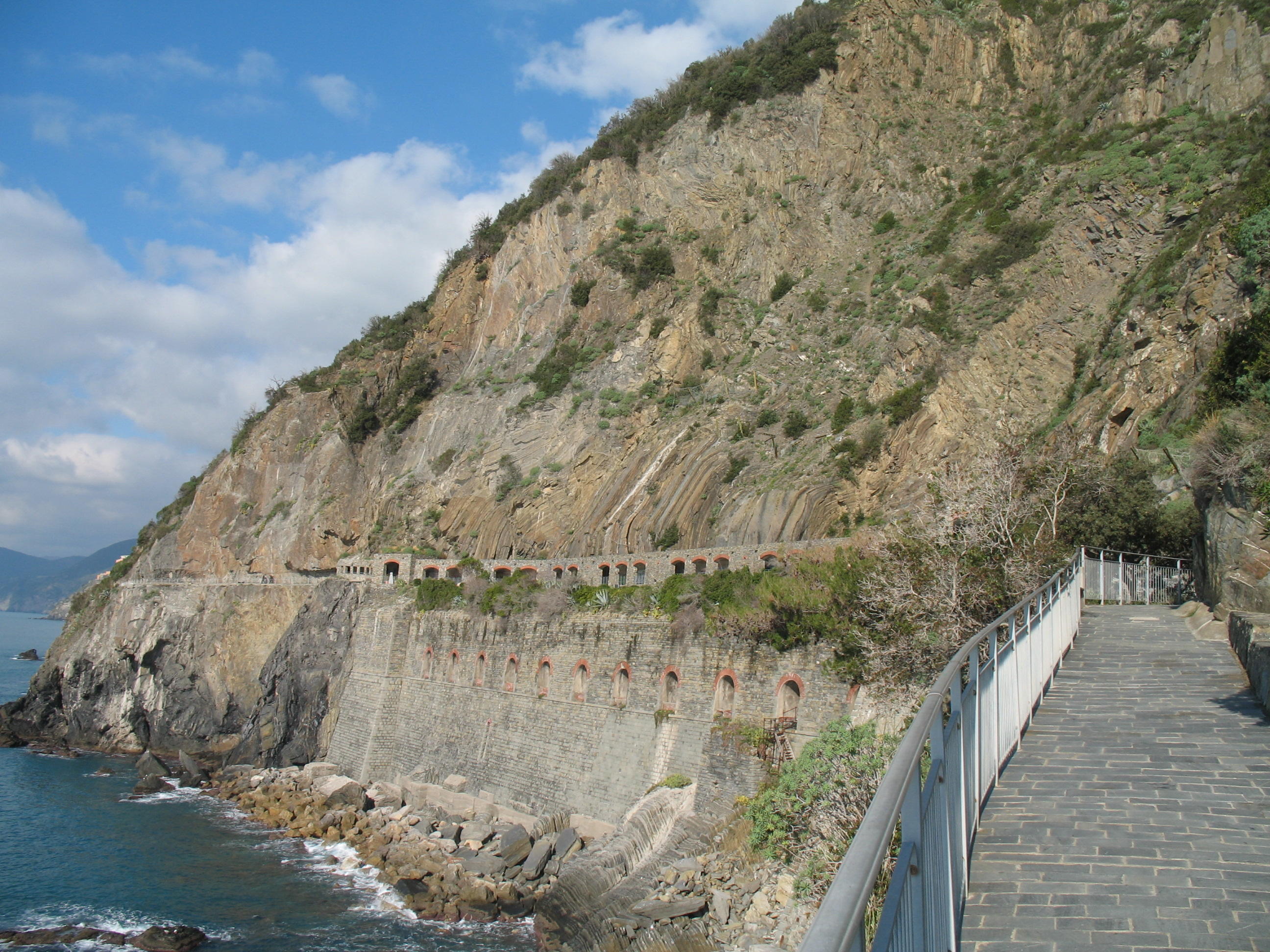 Immagine dalle Cinque Terre Via dell'Amore